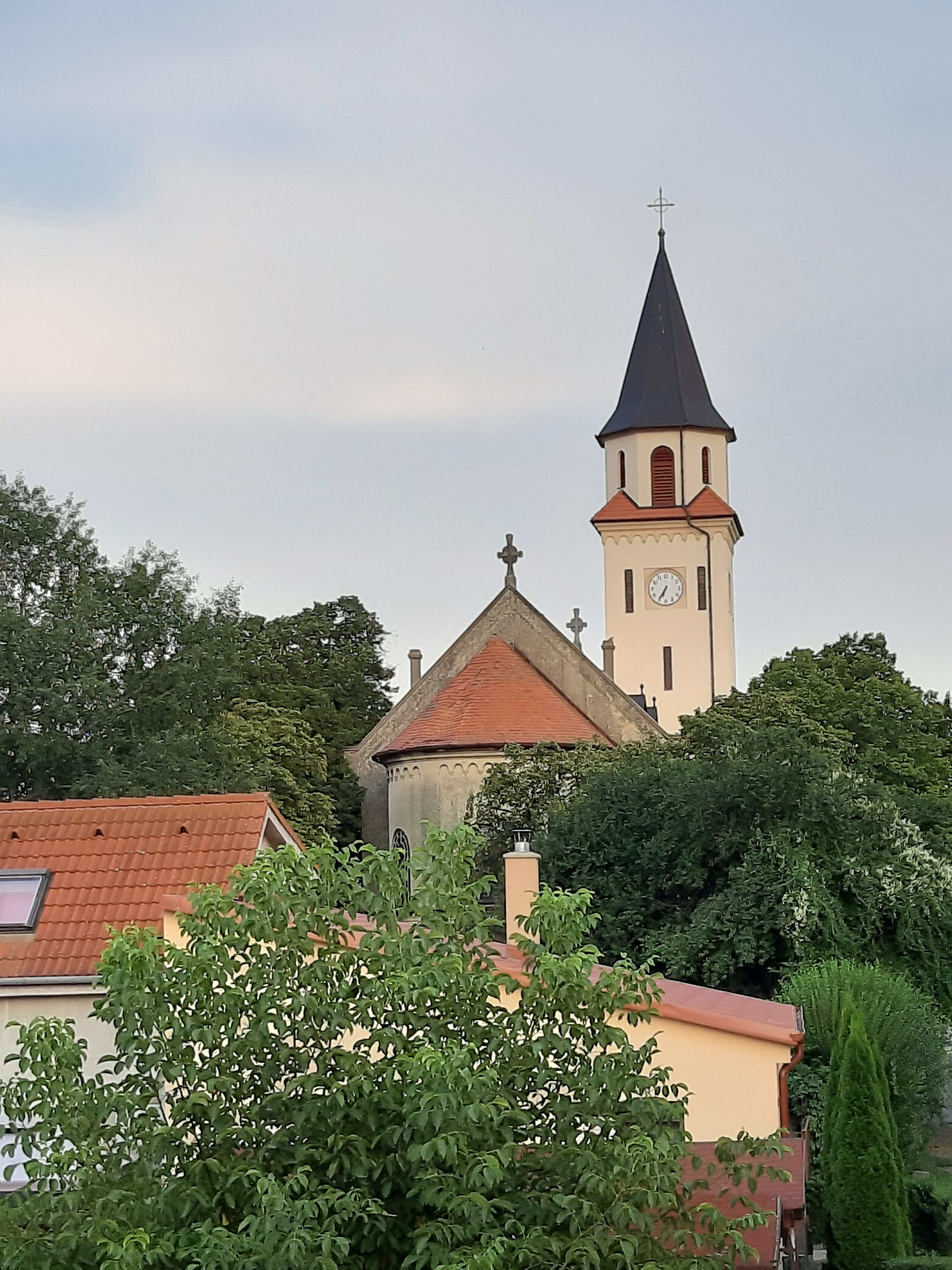 Kalinkovo, rímskokatolícky kostol sv. Františka z Assisi v septembri 2019